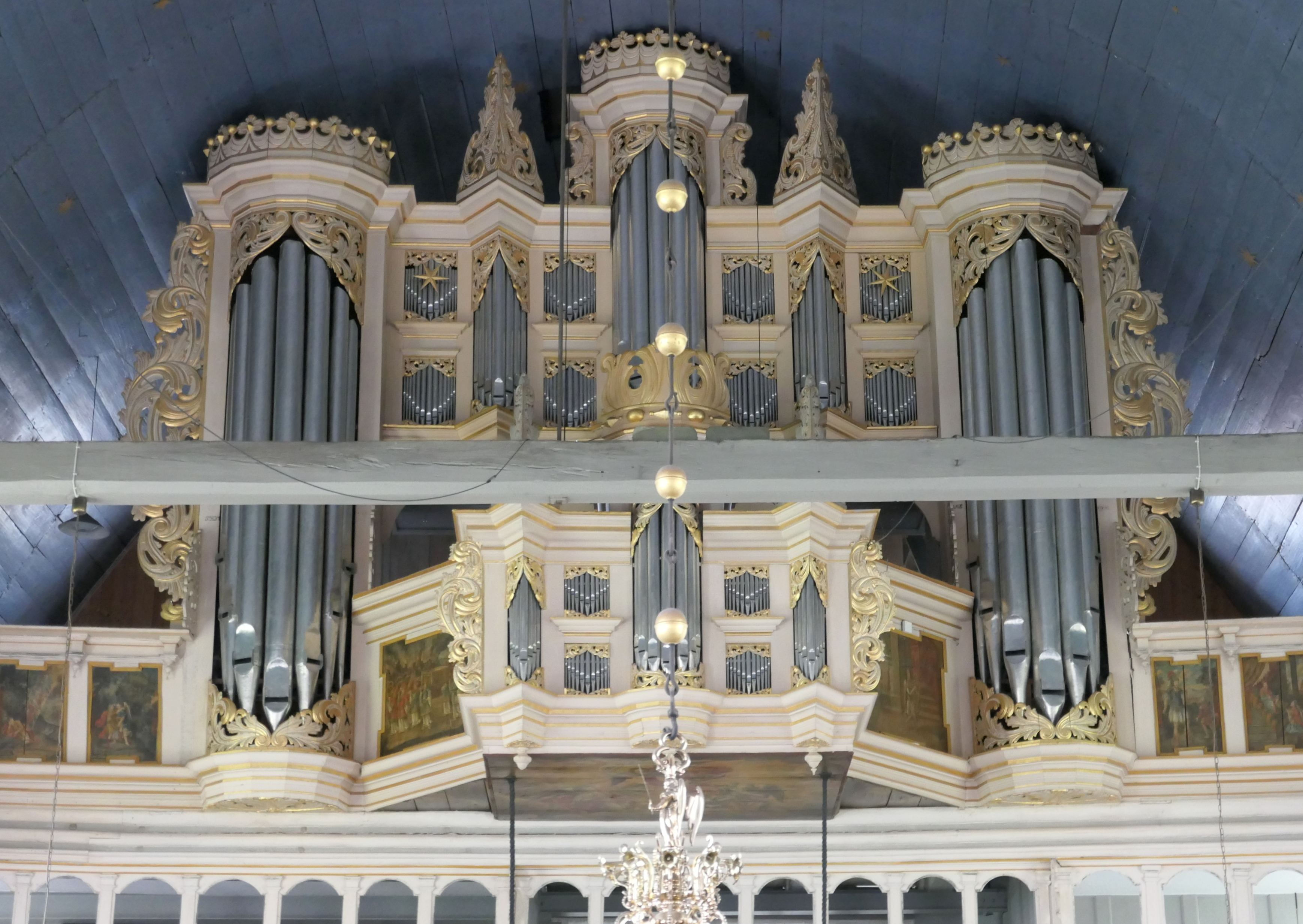 Orgel der St.-Matthias-Kirche Jork, Landkreis Stade, Niedersachsen, Deutschland